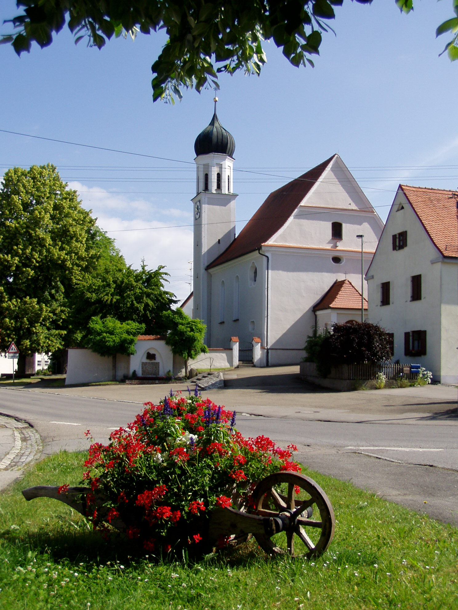 Kirche in Heretsried, Lkr Augsburg